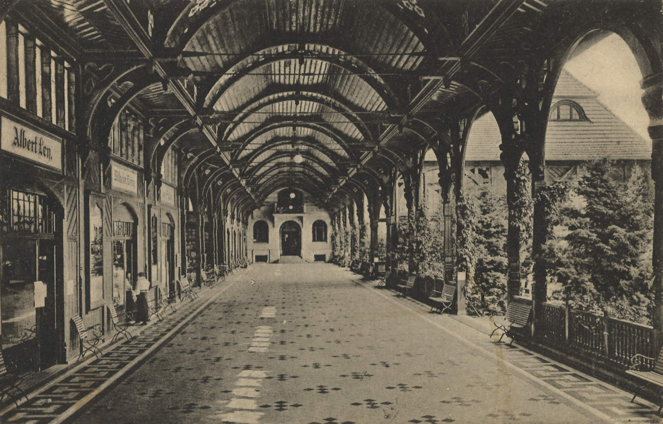 Świeradów-Zdrój (niem. Bad Flinsberg)